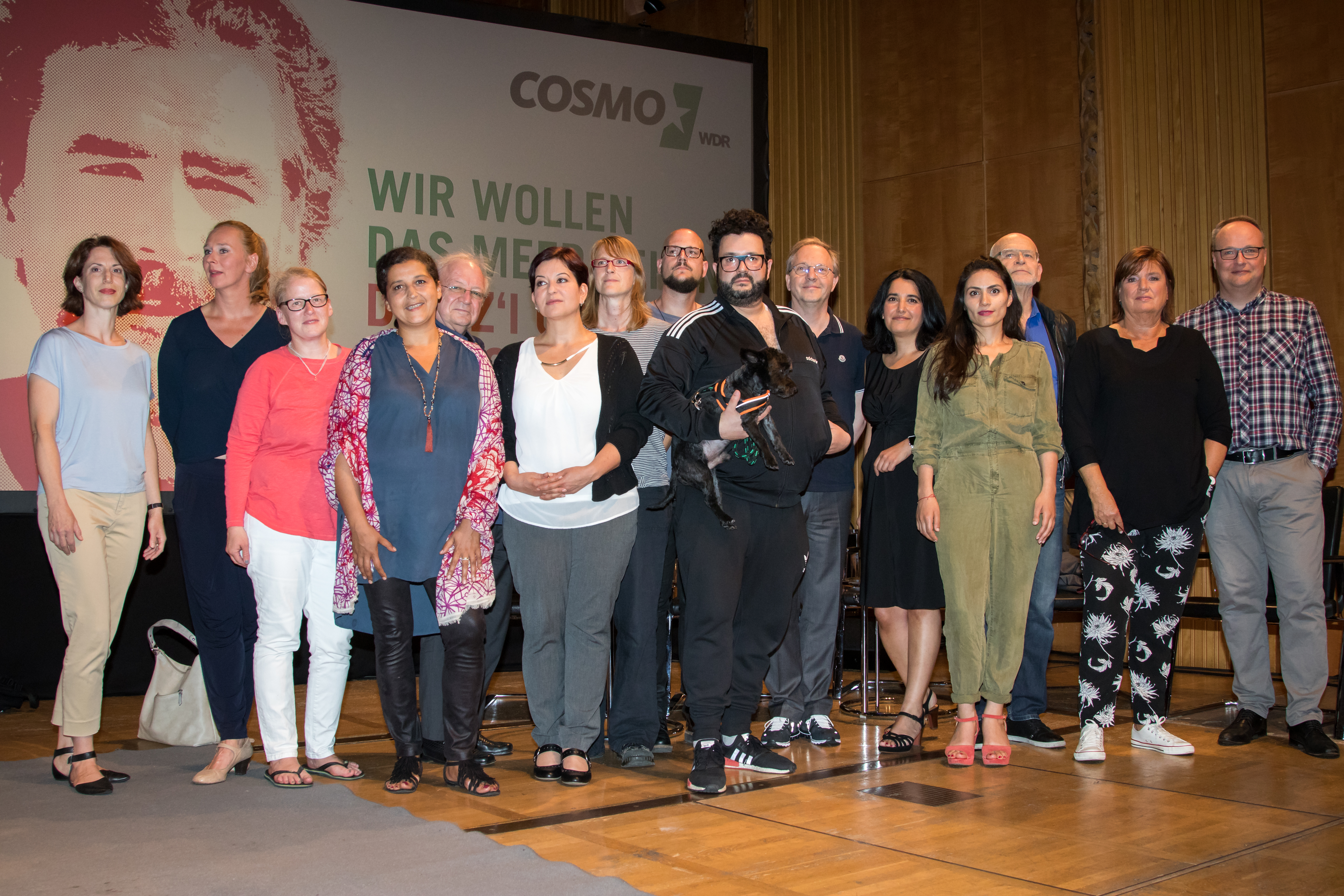 Cosmo - Wir wollen das Meer sehen: Solidaritätsveranstaltung für Deniz Yücel und alle anderen inhaftierten Journalisten gemeinsam mit der Initiative Free Deniz